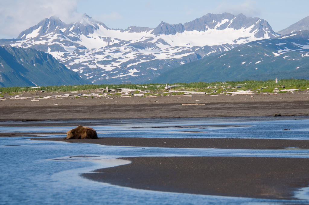 Alaska Brown Bear, Hallo Bay, Katmai National Park, Alaska